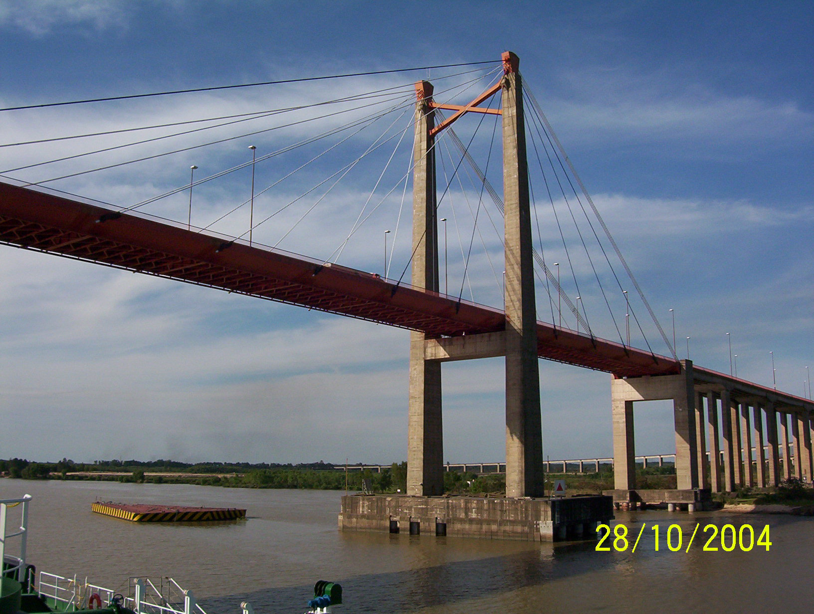 Argentina, Buenos Aires, Puente Zárate Brazo Largo